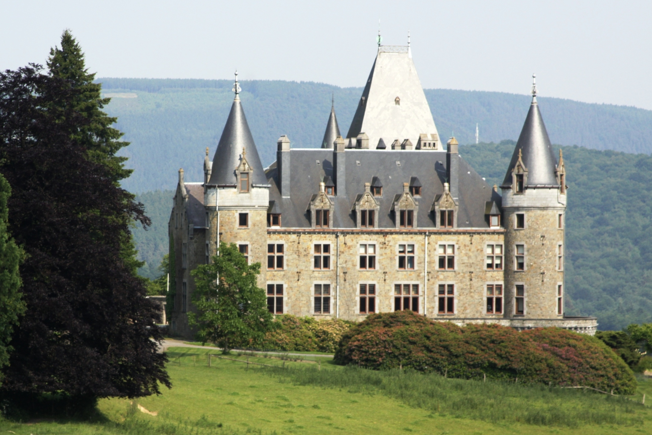 D'Schlass vu Froidcourt. Kategorie:Schlässer an der Belsch Kategorie:Provënz Léck